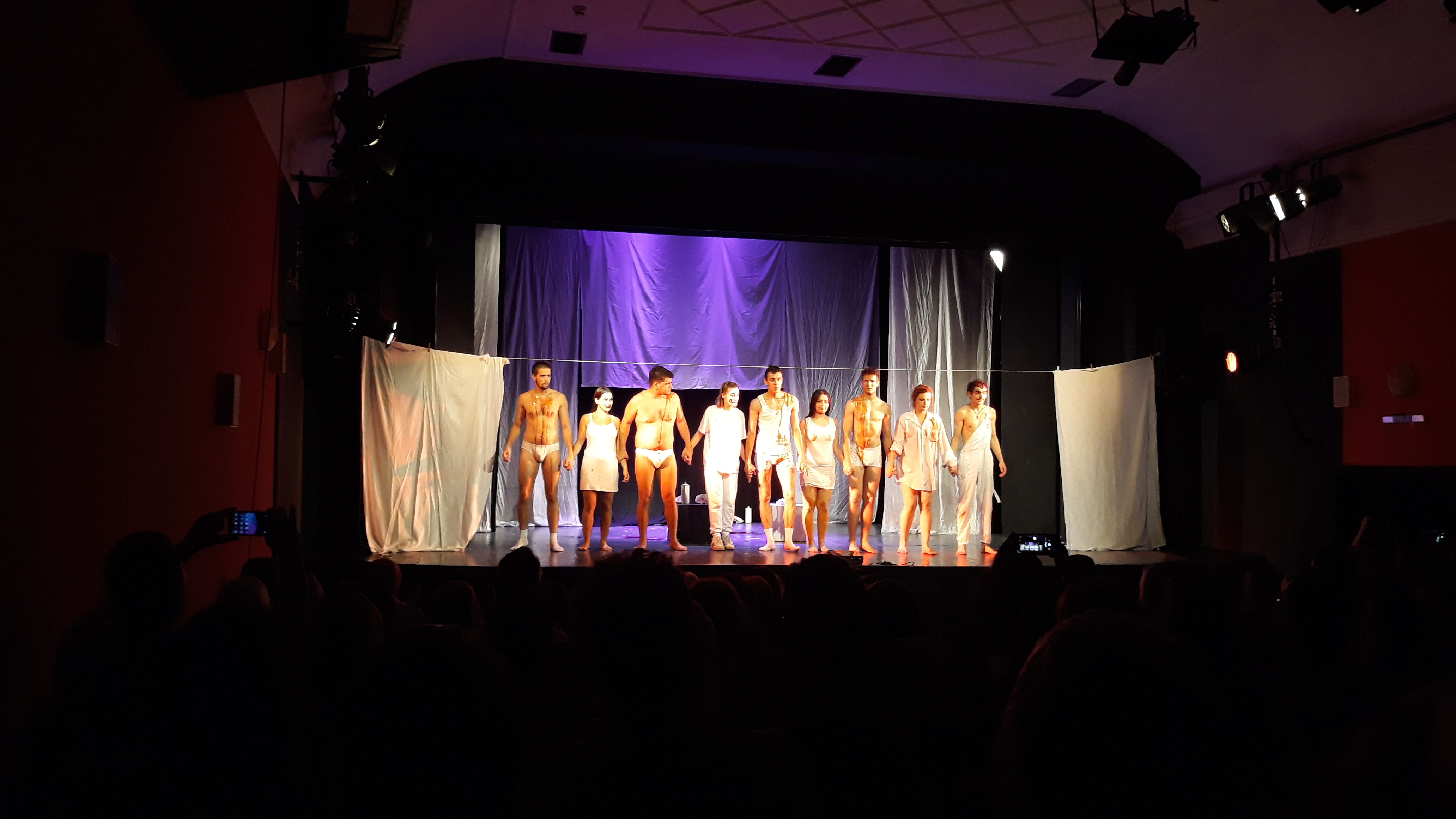 Представа Живот провинцијских плејбоја, у извођењу ансамбла позоришта „Промена“ из Новог Сада. Играју: Дејан Максимовић, Милош Лучић, Ема Муратовић, Раде Маричић, Александра Аризановић, Надежда Јаковљевић, Јулија Петковић, Растко Мићић, Ана Кесеровић и Стеван Узелац.